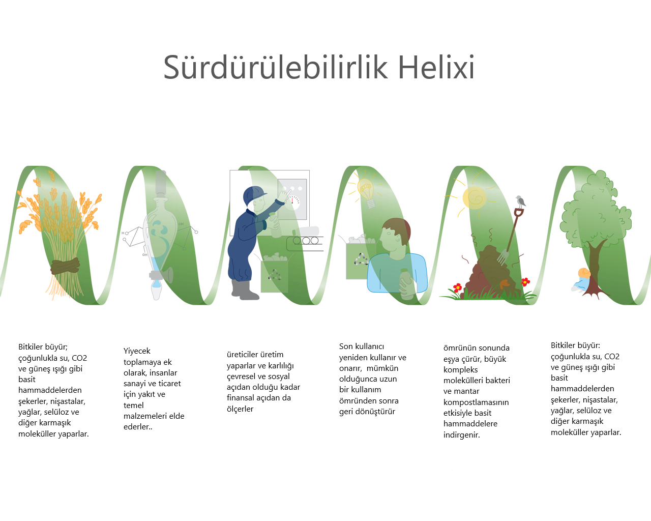 Sürdürülebilirlik heliksi